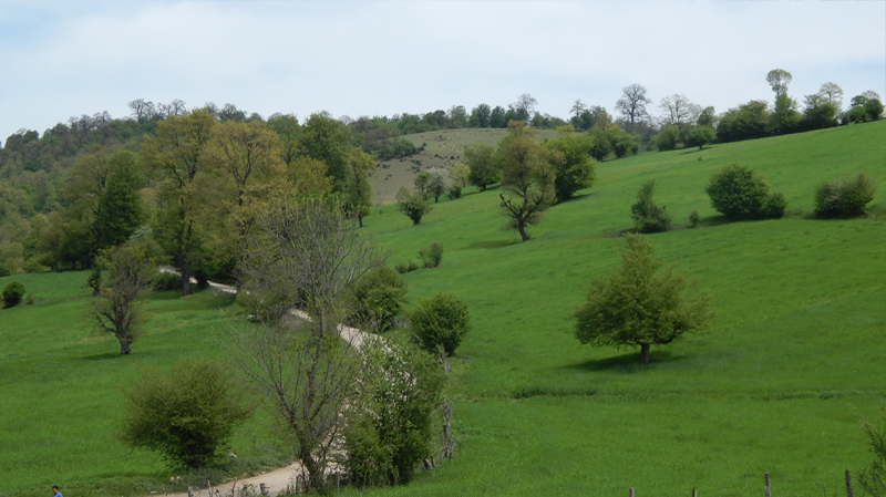 جاده منتهی به دریاچه الندان